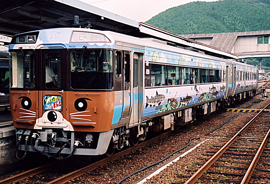 キハ185系気動車 「I LOVE しまんと」